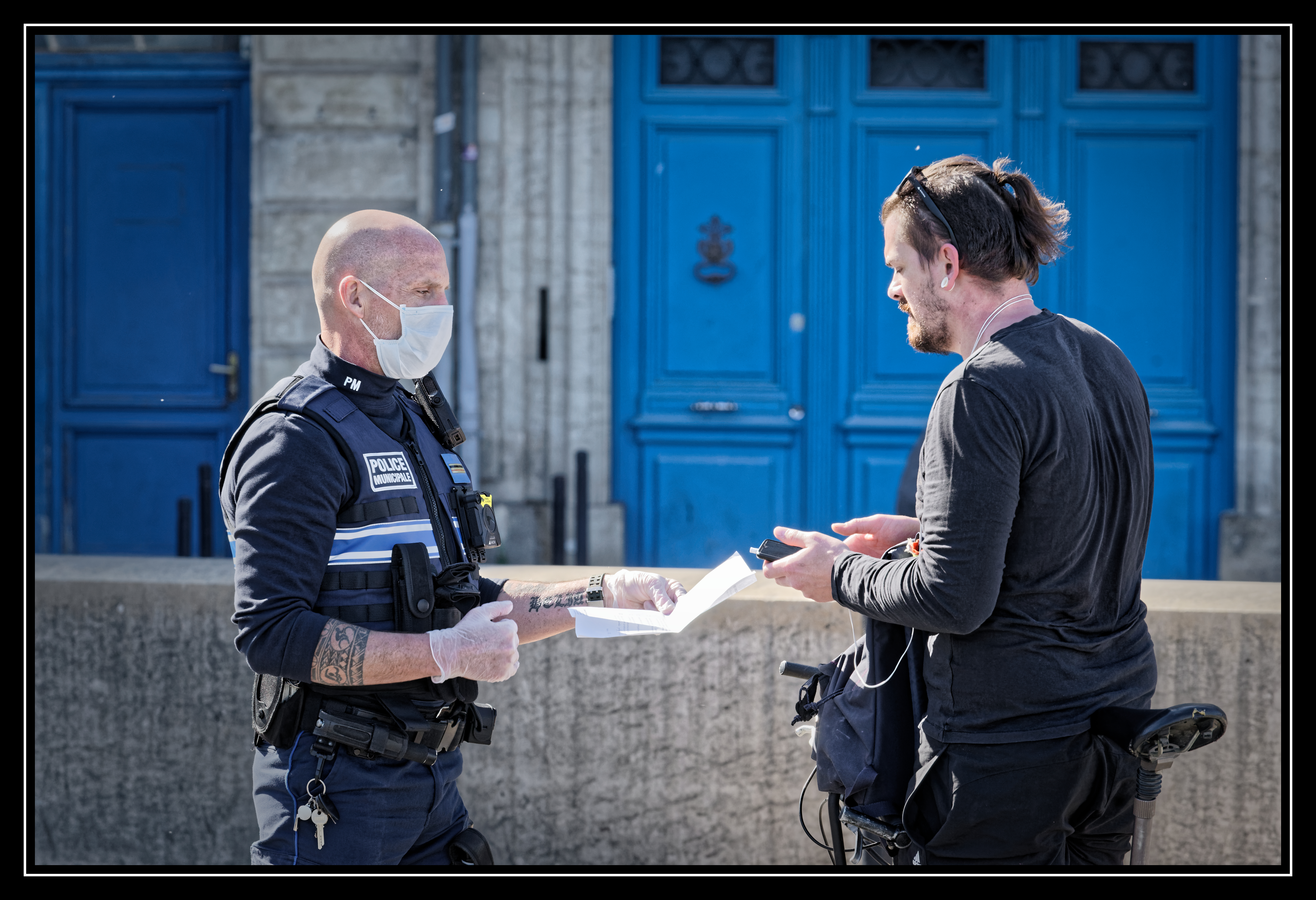 Intervention Police Municipale de Bordeaux_ contrôle attestation de déplacement pandémie Covid-19